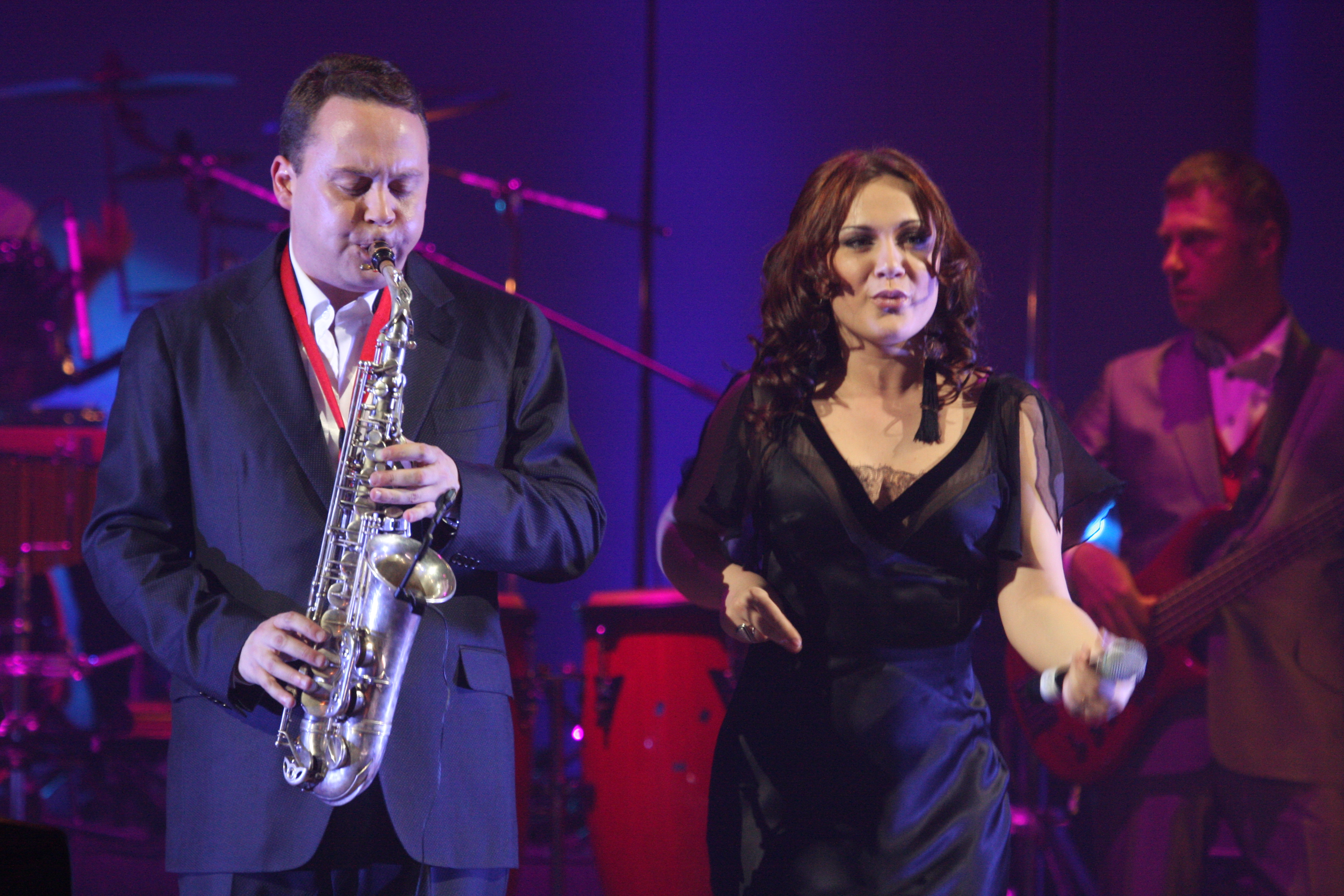 Алекс Новиков на выступлении